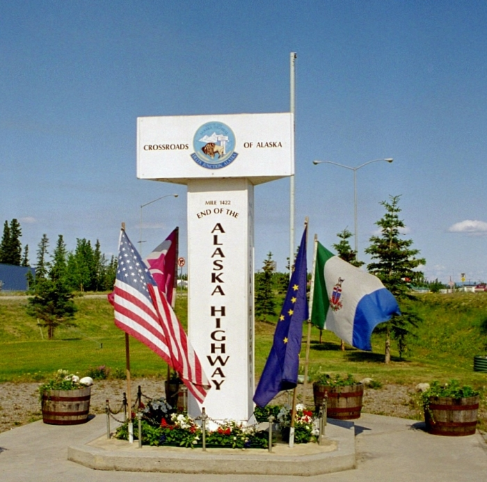 Denkmal in Delta Junction, das das Ende des Alaska Highways markiert eigenes Foto aus dem Jahr 2003, gemeinfrei